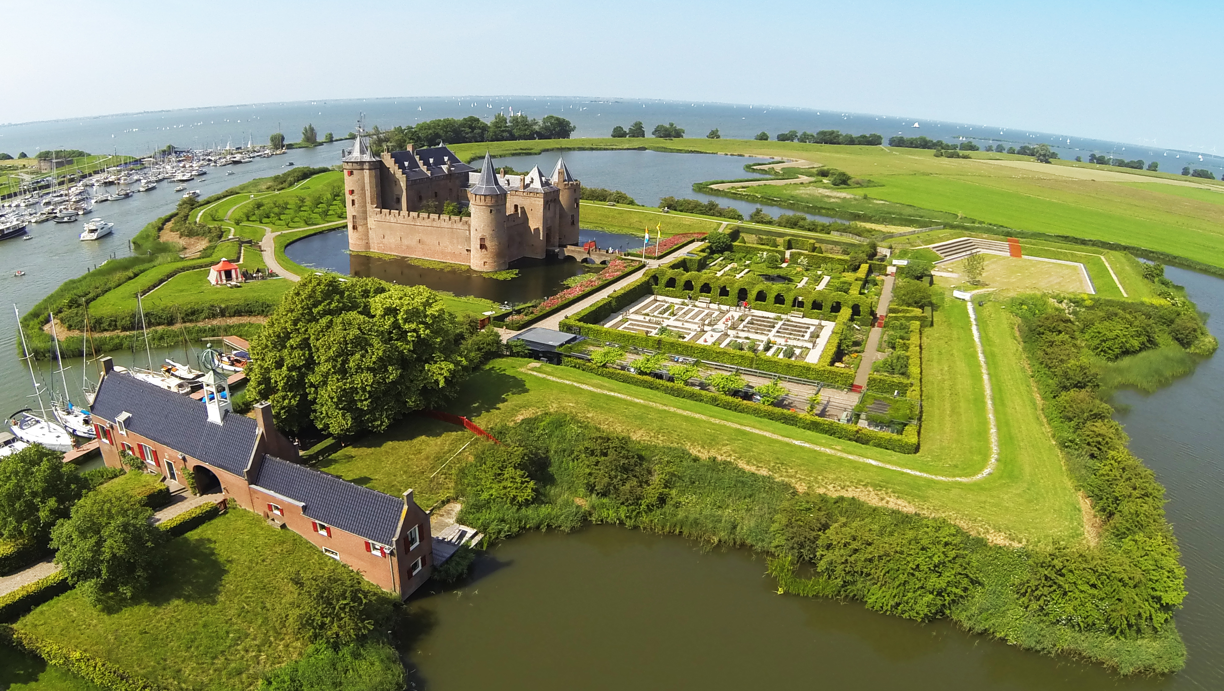 Foto van Muiderslot is genomen met een drone van Beemflights.nl in de zomer van 2013